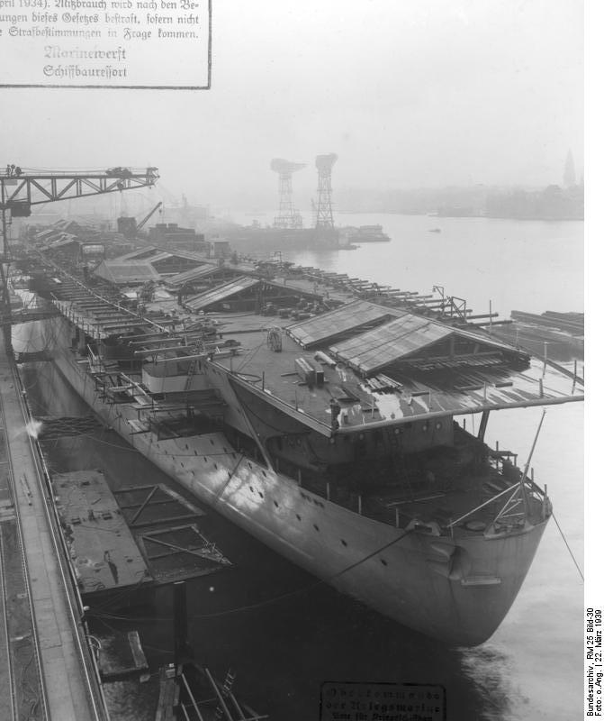 Flugzeugträger "A". Baustadium Aufgen. am 22.3.1939 Deutsche Werke Kiel